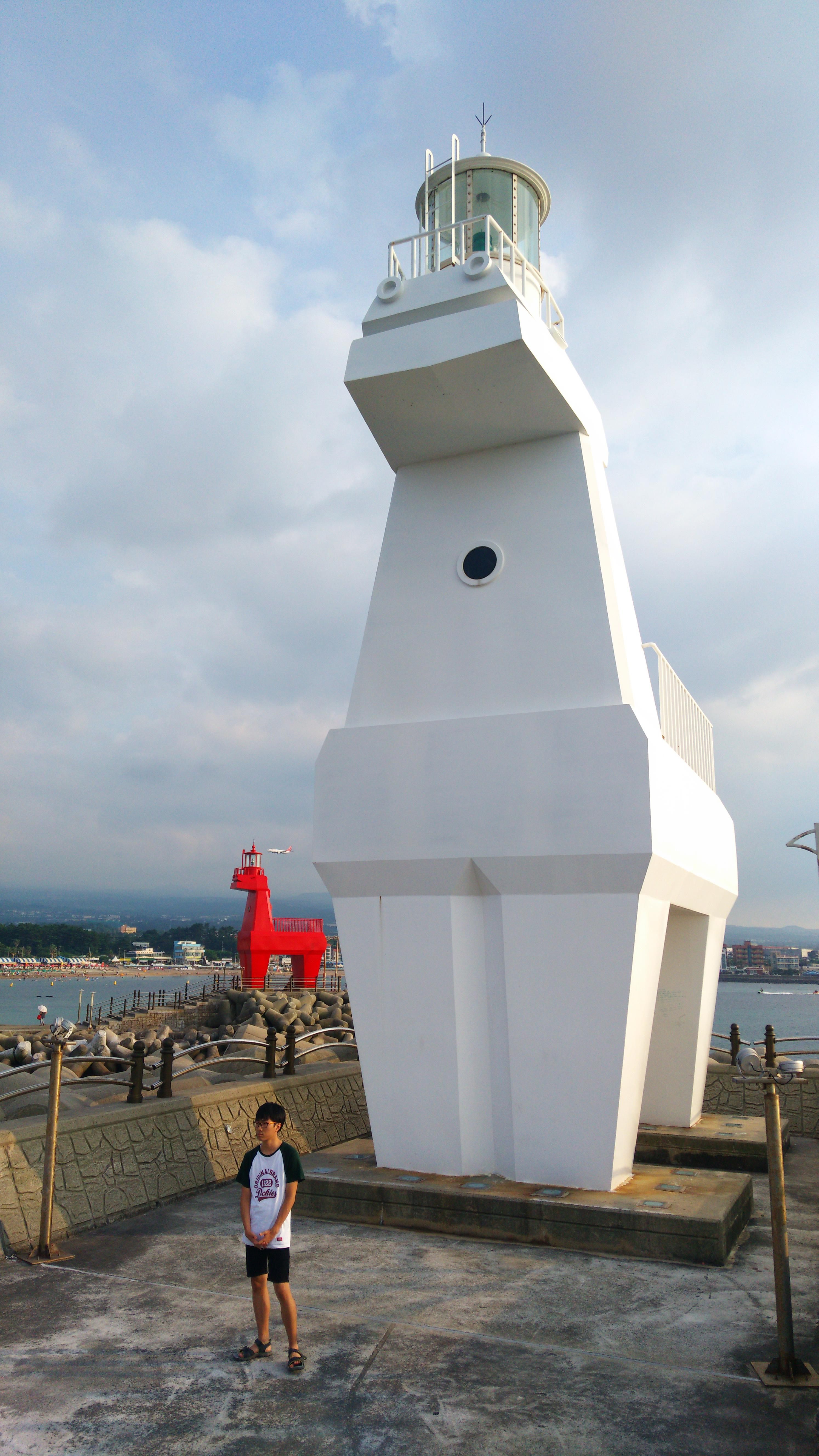 Ihoil-dong, Jeju-si, Jeju-do, South Korea